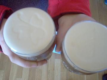 Klavertje en harpje in het schuim van twee "pints of Guinness". Dat harpje is trouwens wel weer pokke te zien trouwens... Die rechter met het harpje heb ik ook zelf leeggedronken. :-)